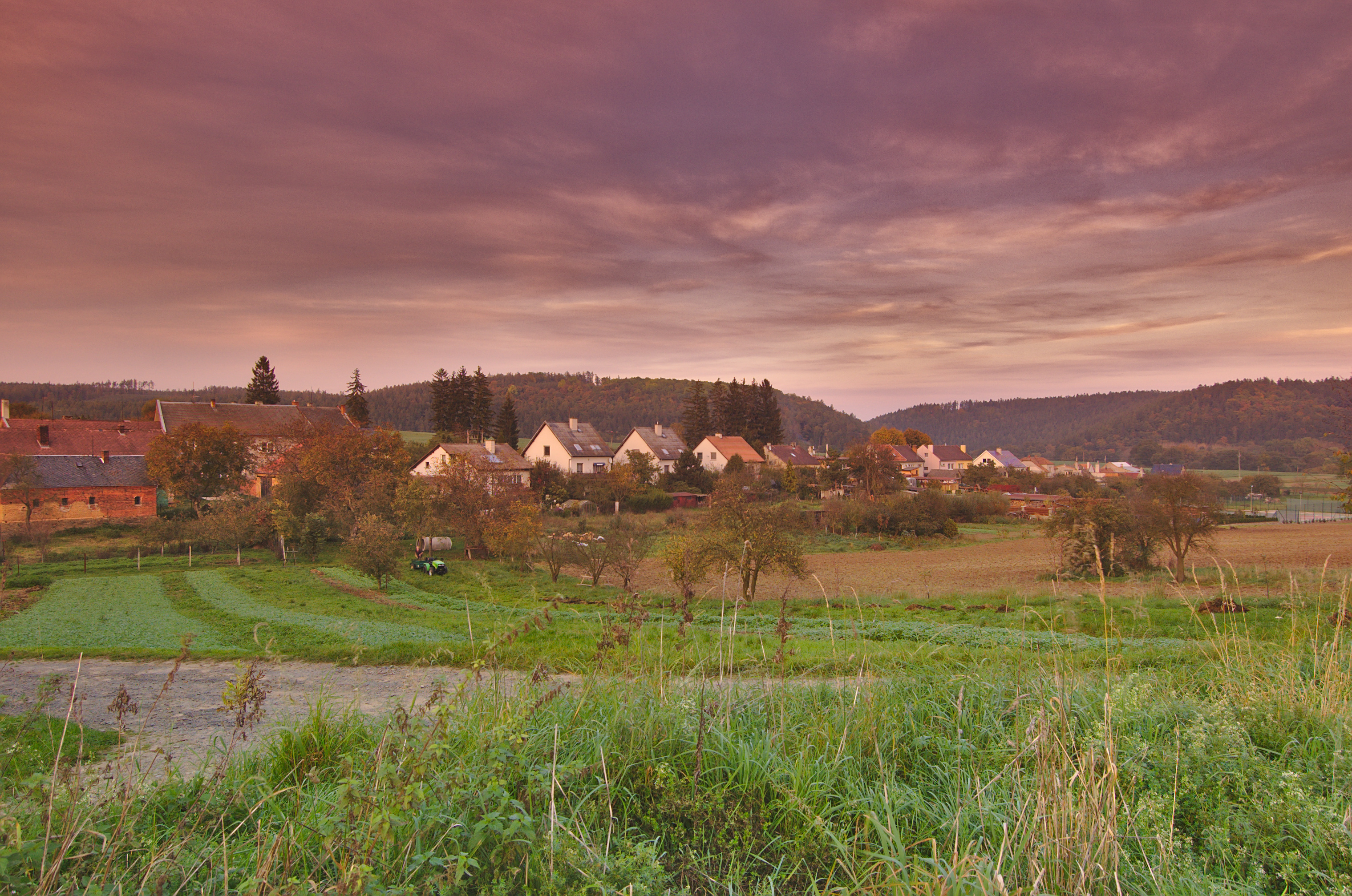 Pohled na obec od jihu při západu slunce, Laškov, okres Prostějov